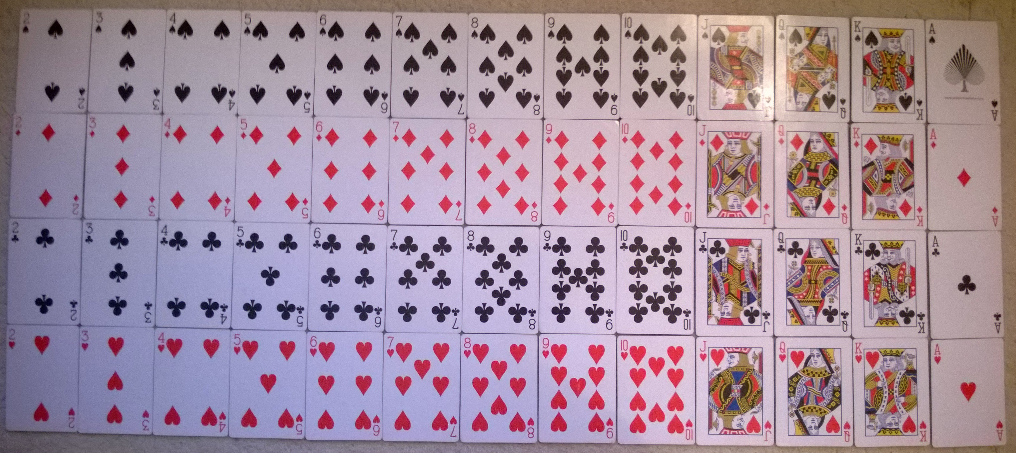 Situs judi online yang menyediakan poker online.